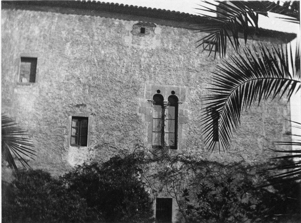 Vista parcial de Torre Llobeta o Manso Argemí. Jordi Audet i Viñals (Entre 1926 i 1928)